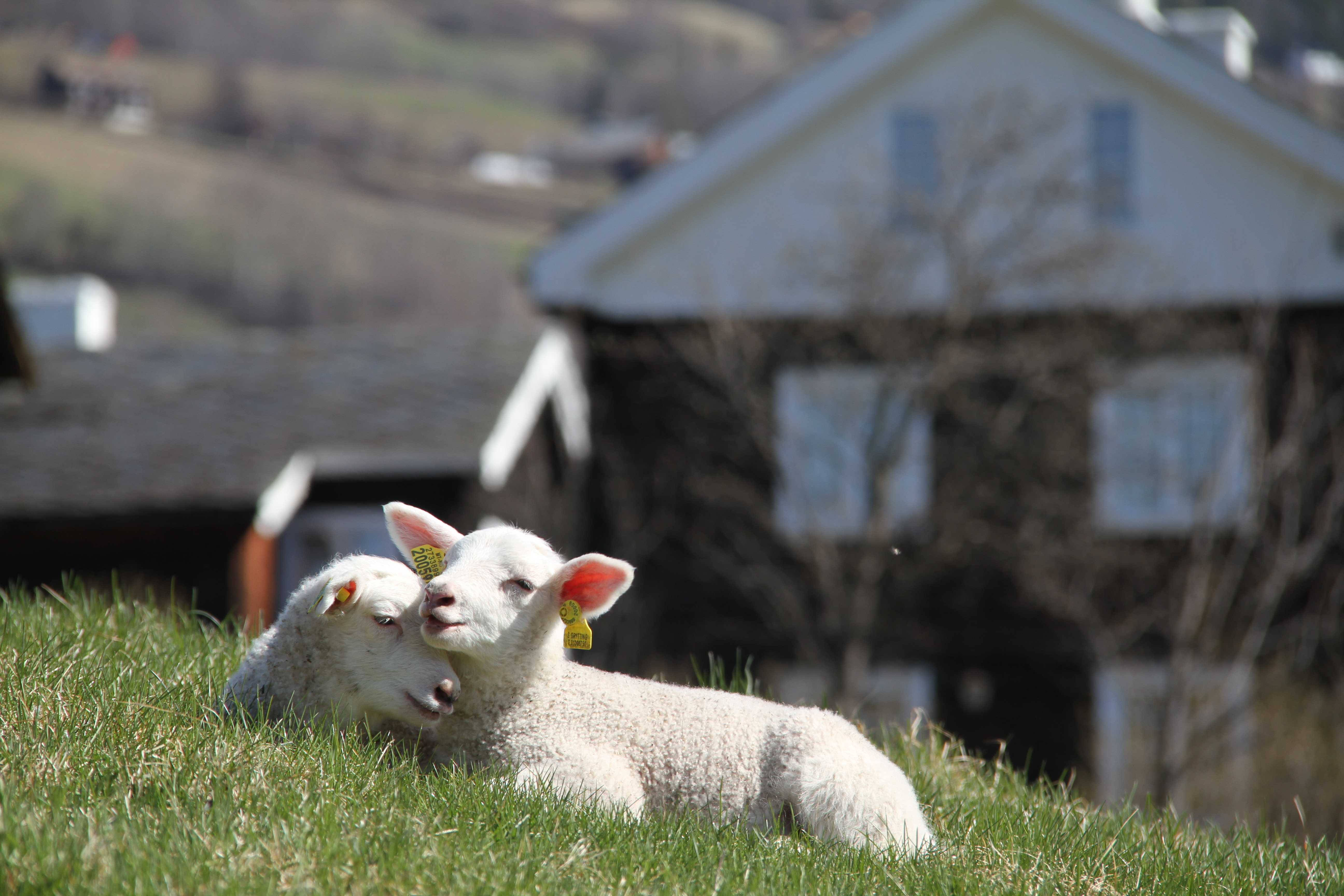 Lam på Sygard Grytting Foto: Amund Grytting